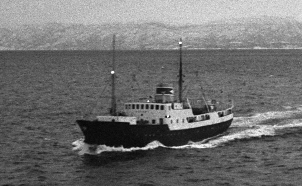 M/S Skogøy, ODS-skip, på tur på Ofotfjorden